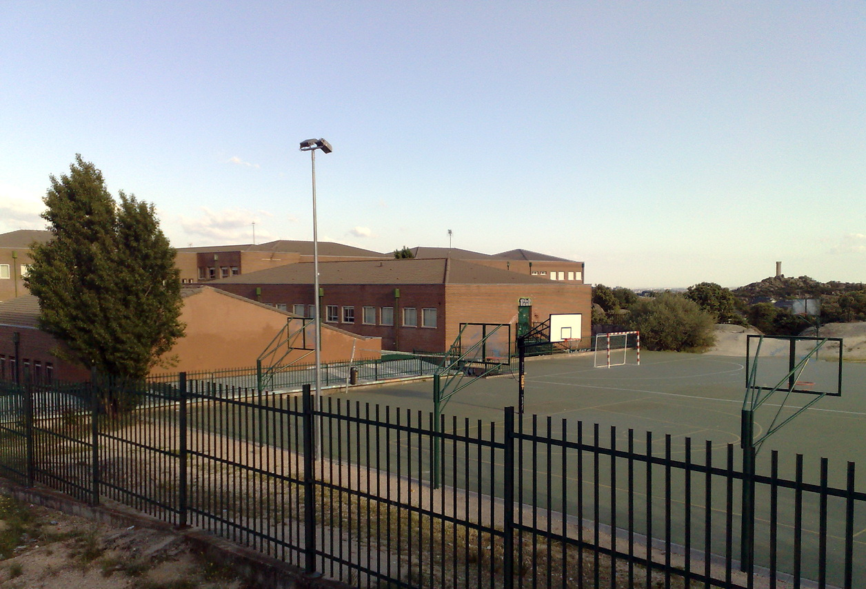 Torrelodones. IES Diego Velázquez.Pistas deportivas.